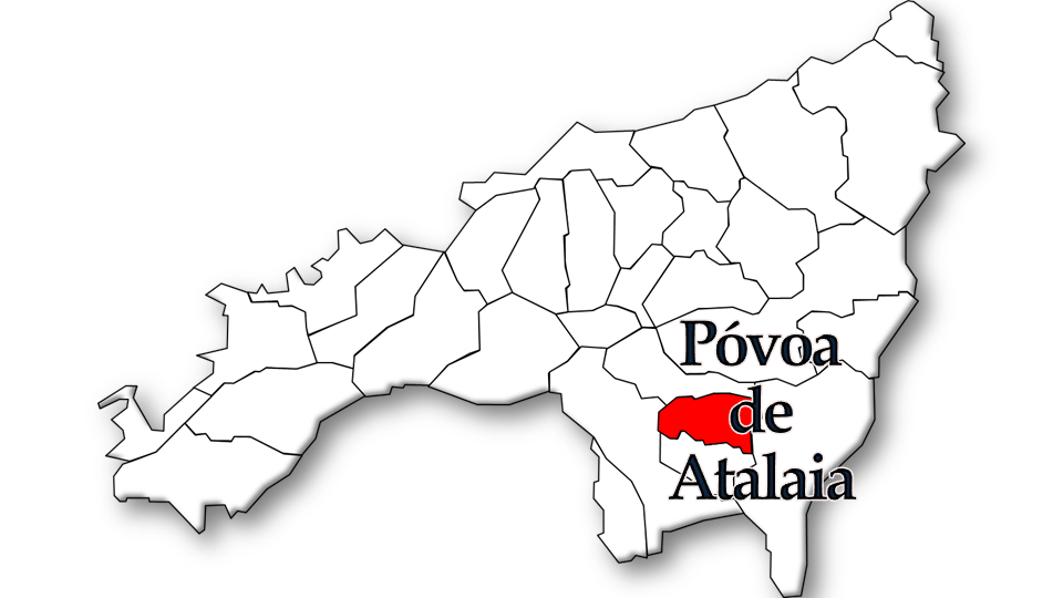 População